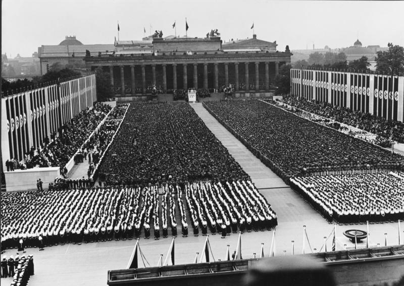 Berlin Olympiade 1936